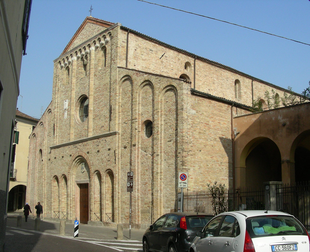 Italia, Veneto, Padova, chiesa di Santa Sofia , facciata